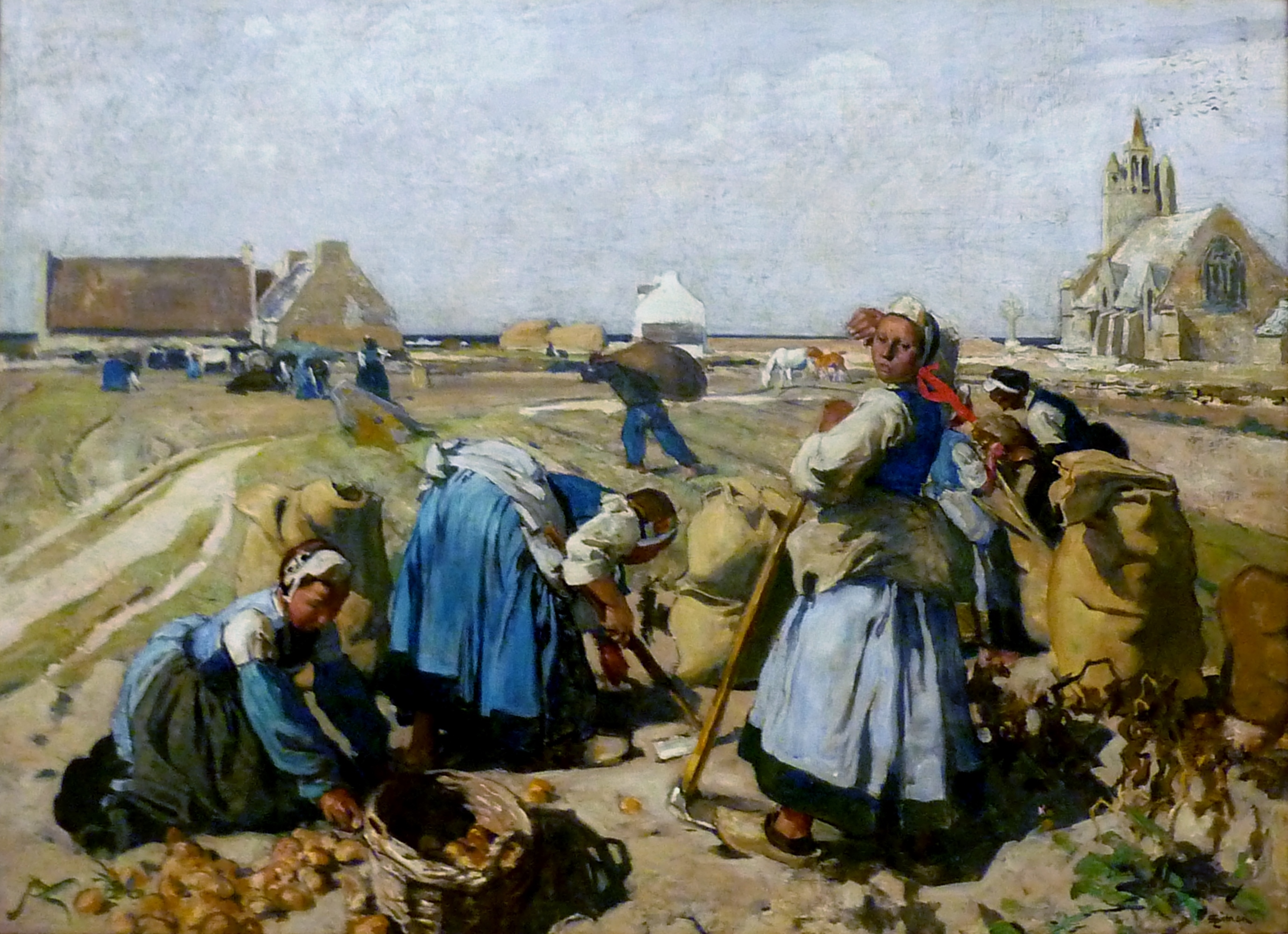 La scène représentée montre des paysannes bigoudènes devant la chapelle Notre-Dame de la Joie à Penmarc'h.